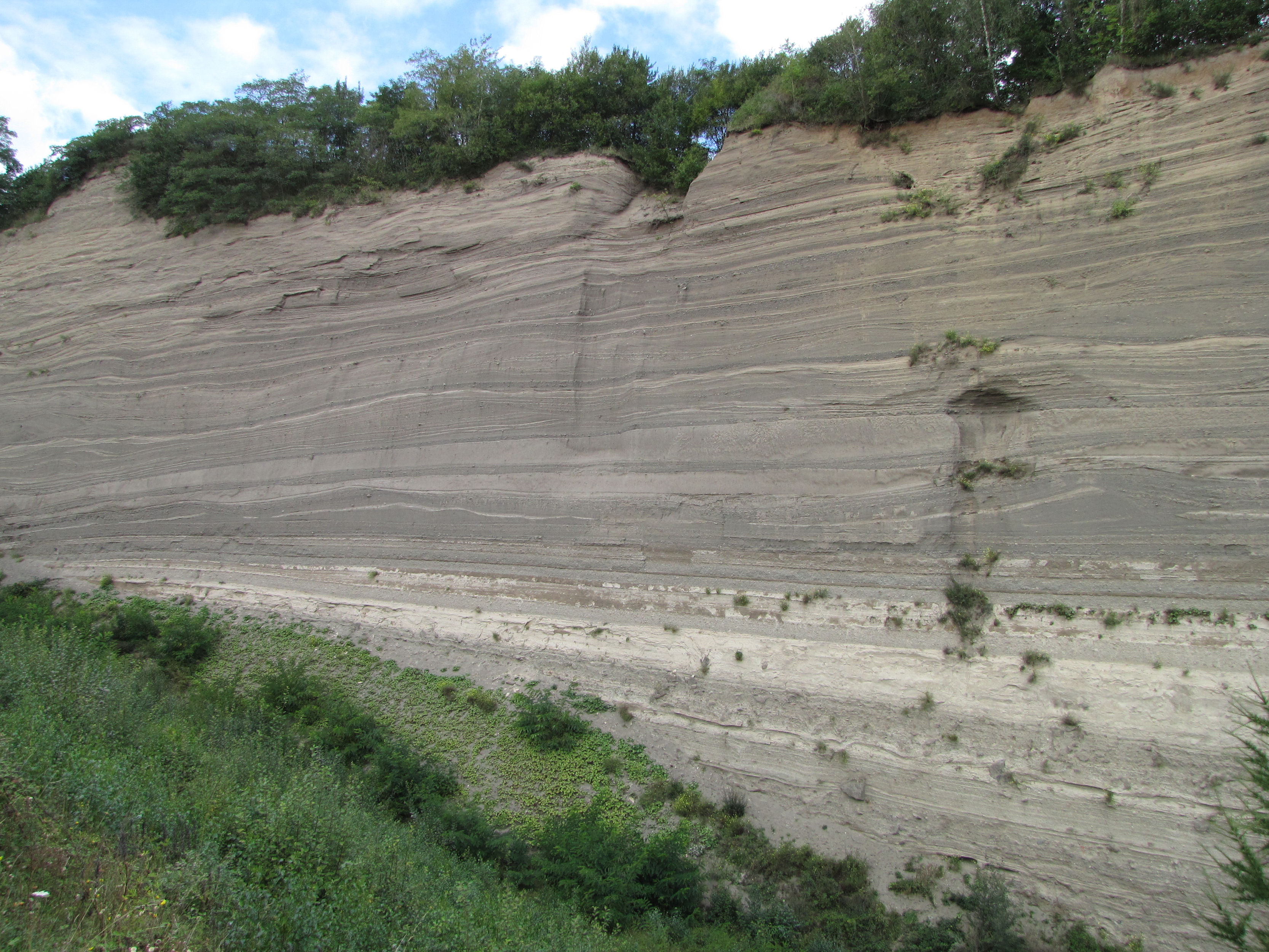 Die Wingertsbergwand nahe dem Laacher See im Vulkanpark des Landkreises Mayen-Koblenz